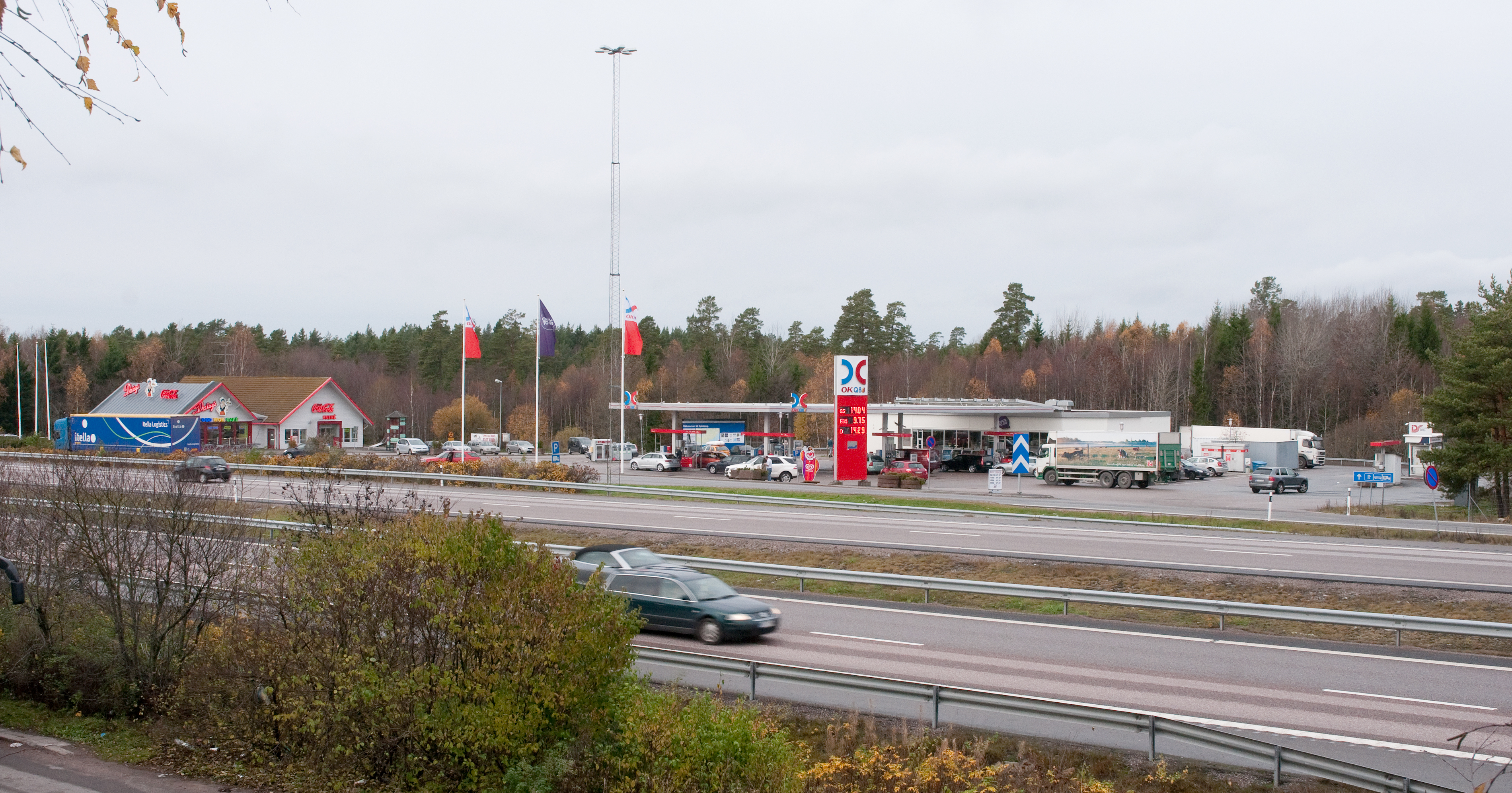 Sillekrog väster. Rastplats på E4 i Södermanlands län, sydost om Vagnhärad och 32 kilometer nordost om Nyköping.